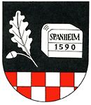 Wappen von Siesbach